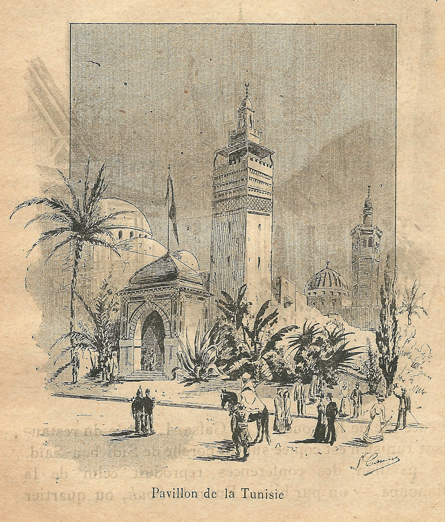 Une des illustrations du "Guide remboursable" de l'Expo 1900